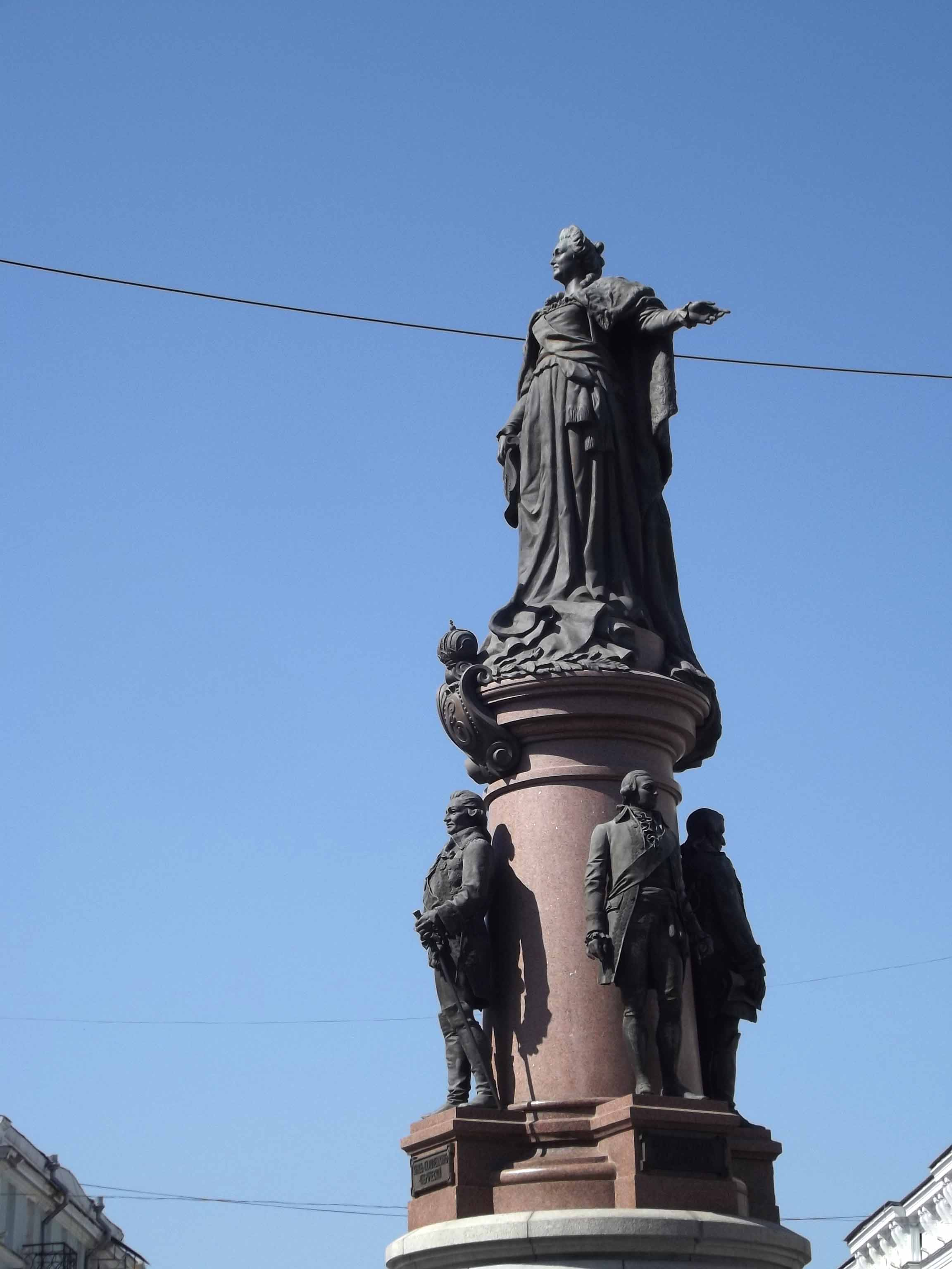 Памятник основателям города